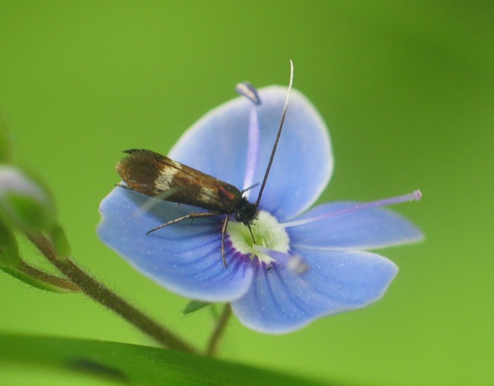 Cauchas fibulella an Veronica chamaedrys saugend